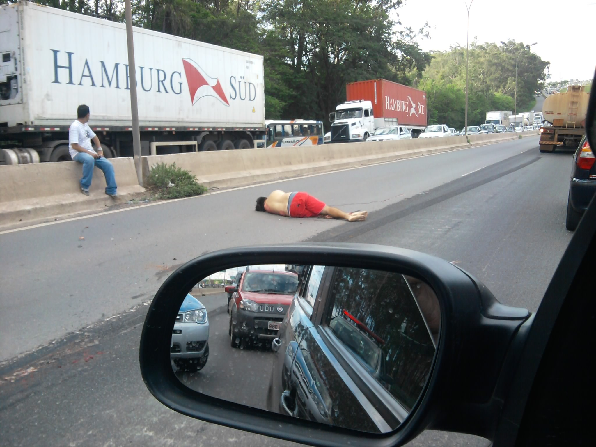 Acidente numa BR em Goiás em novembro de 2011